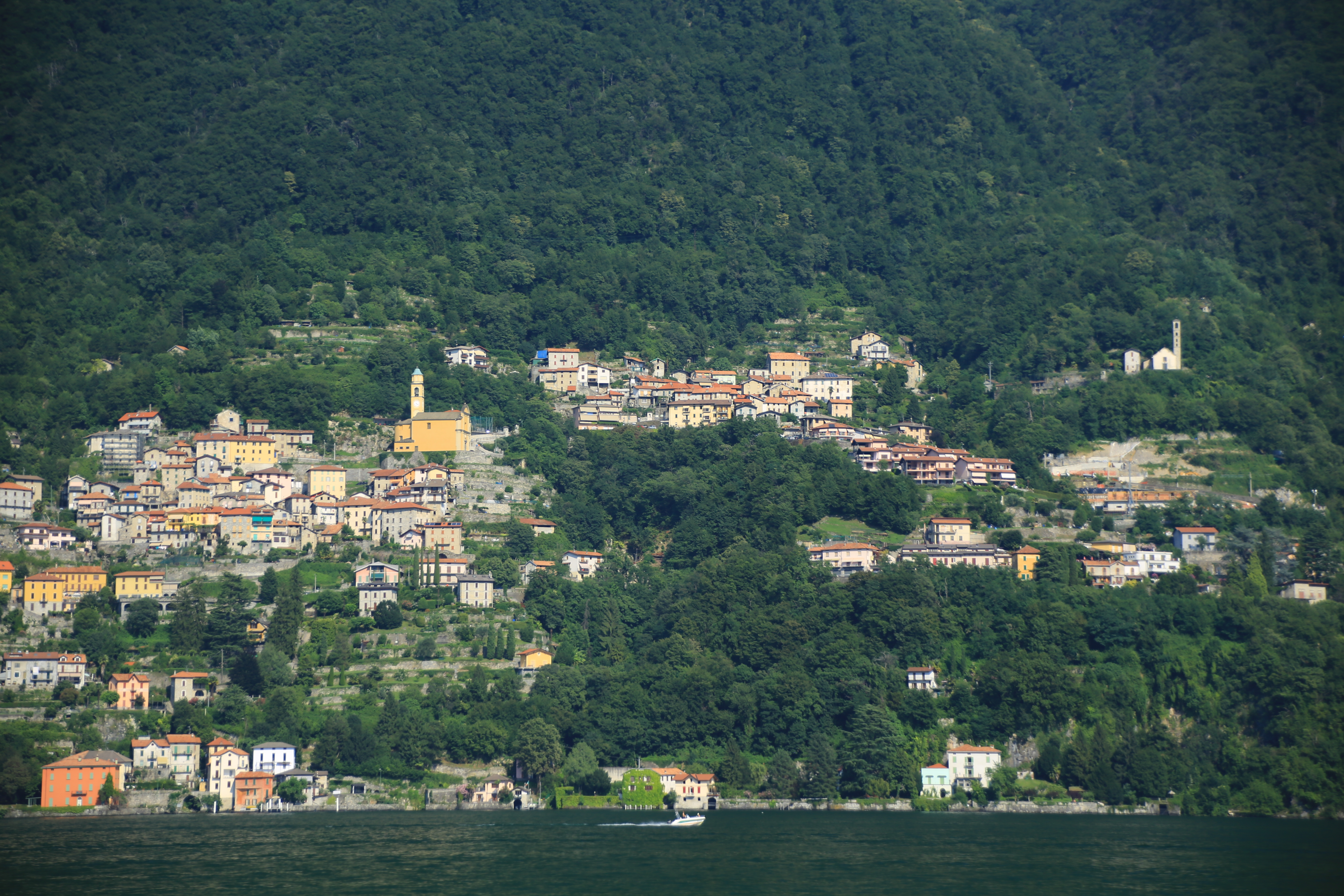 20170707_LakeComo_0179